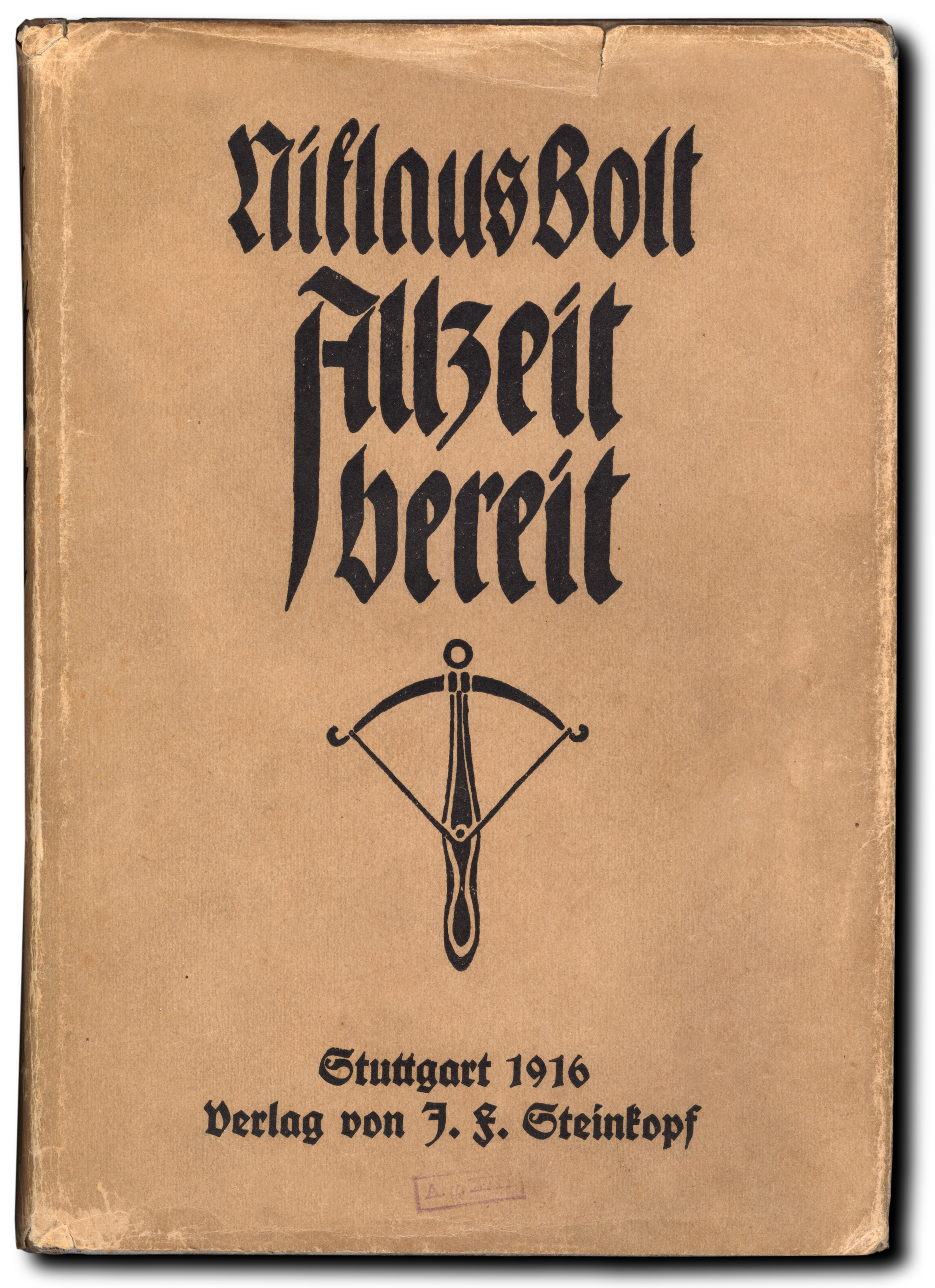 Schutzumschlag des Pfadfinderbuches „Allzeit bereit“ des Schweizer Pfarrers und Jugendschriftstellers Niklaus Bolt.